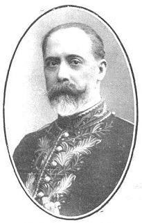 Retrato de José Codina Castellví, fotografía Kaulak publicada en la revista española Mundo Gráfico.